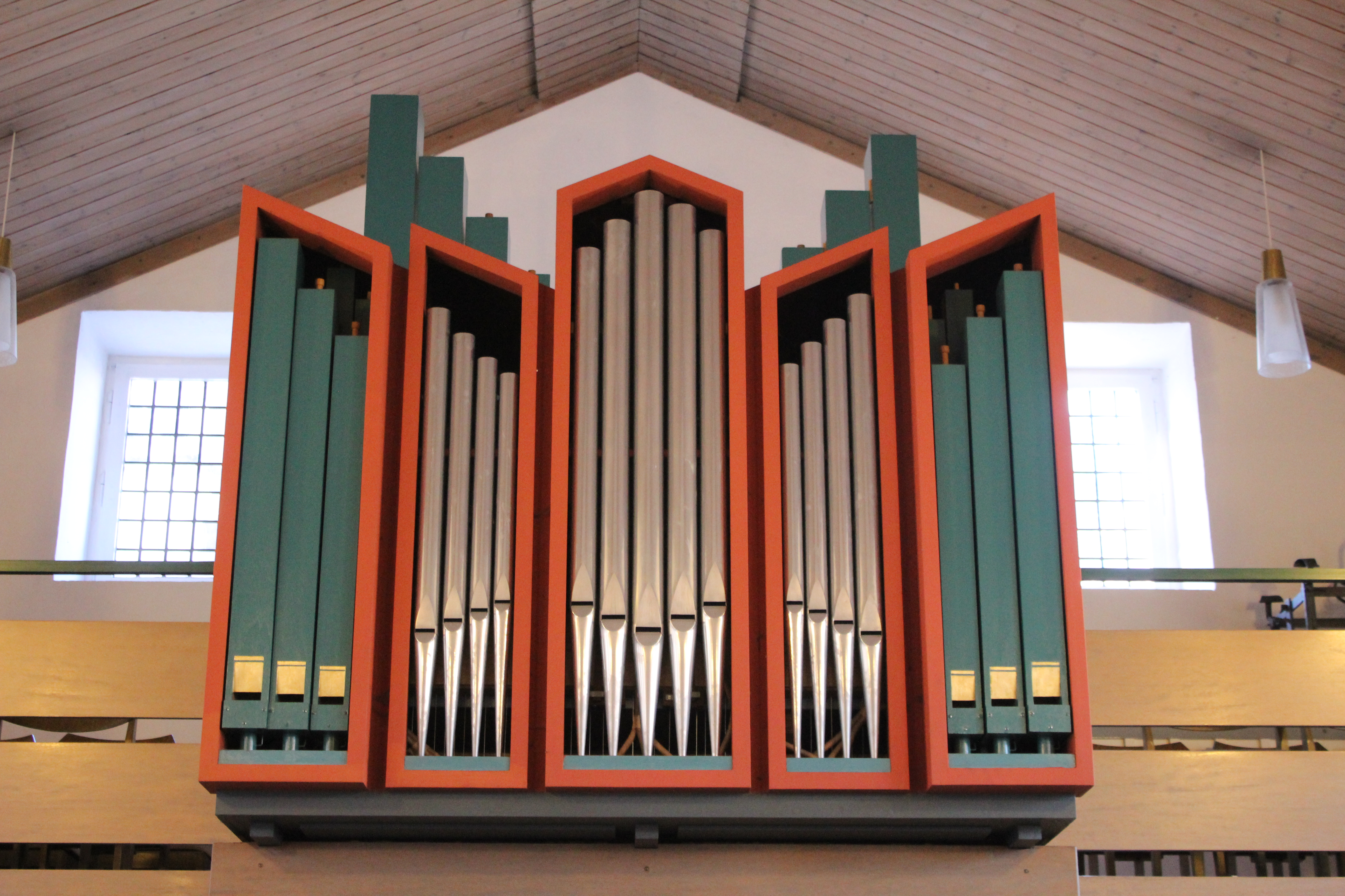 Evangelische Kirche Leidenhofen, Gemeinde Ebsdorfergrund, Landkreis Marburg-Biedenkopf, Hessen, Deutschland